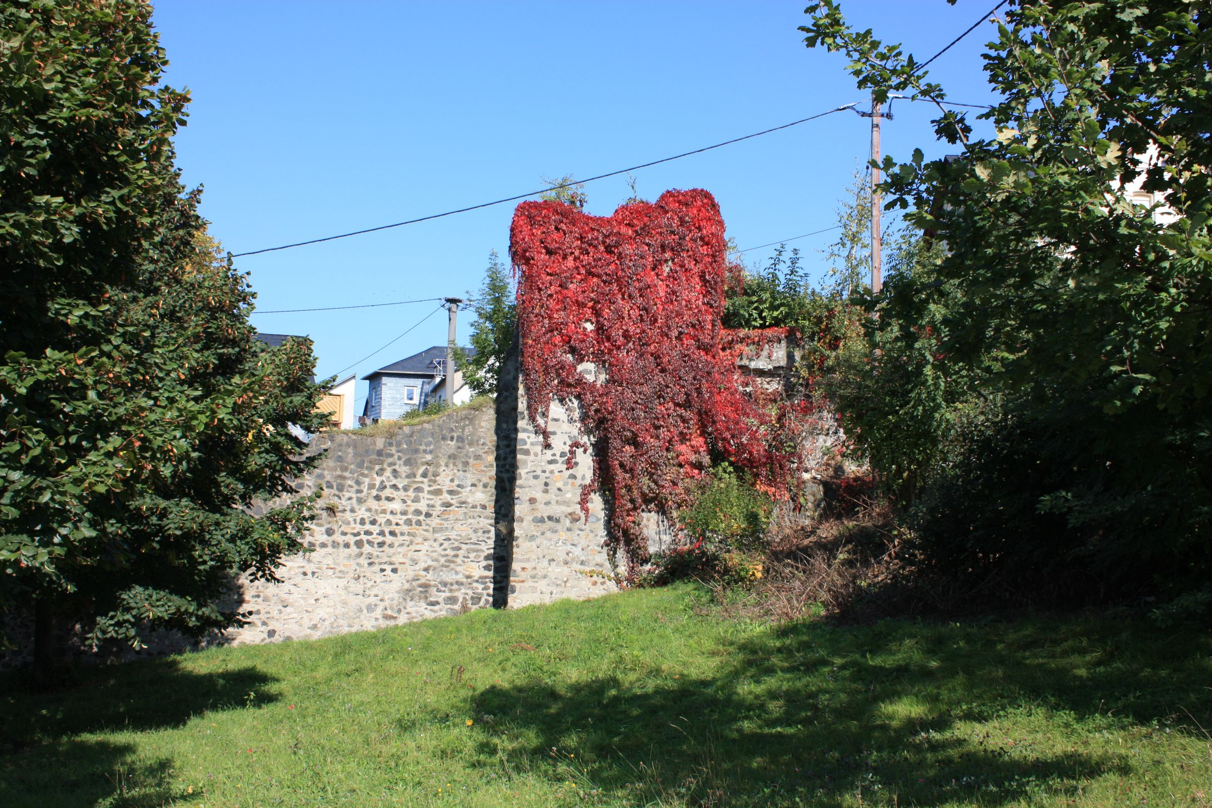 Erhaltene Reste der Stadtmauer von Montabaur, Rheinland-Pfalz, in der Nähe der ehemaligen Fröschpforte